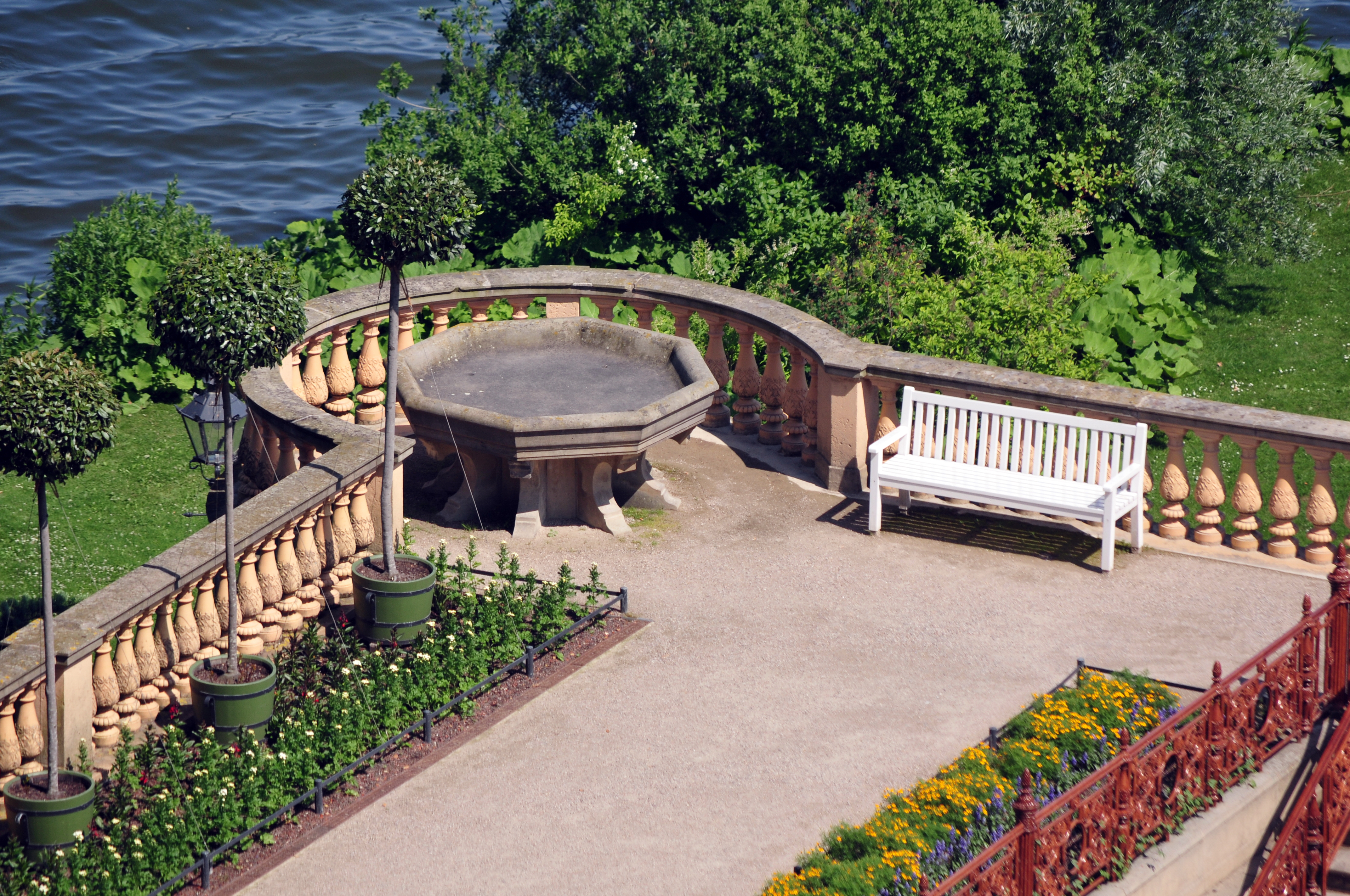 Schweriner Schloß; Orangerie und Schloßgarten